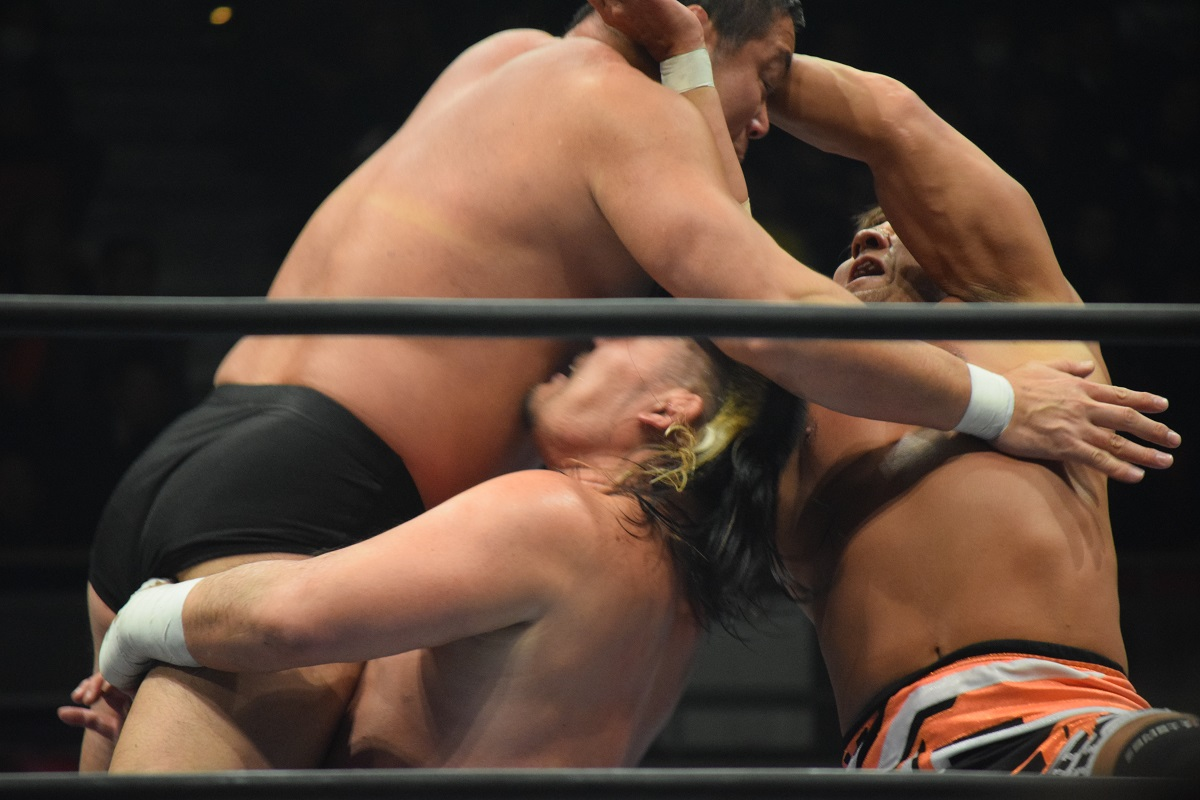 2016年2月11日 大阪府立体育会館 「THE NEW BEGINNING in OSAKA」 中西学（左）にテンコジカッターを決める天山広吉（中）と小島聡（右）